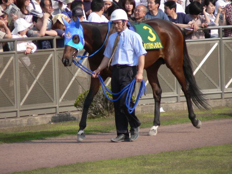 アドマイヤドン（第17回かしわ記念）